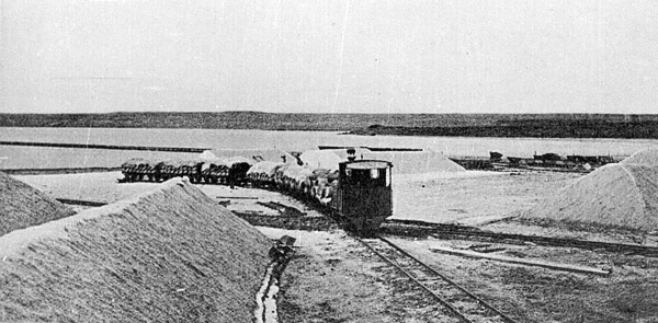 Una locomotora y su tren en las salinas. Se ven montones de sal.